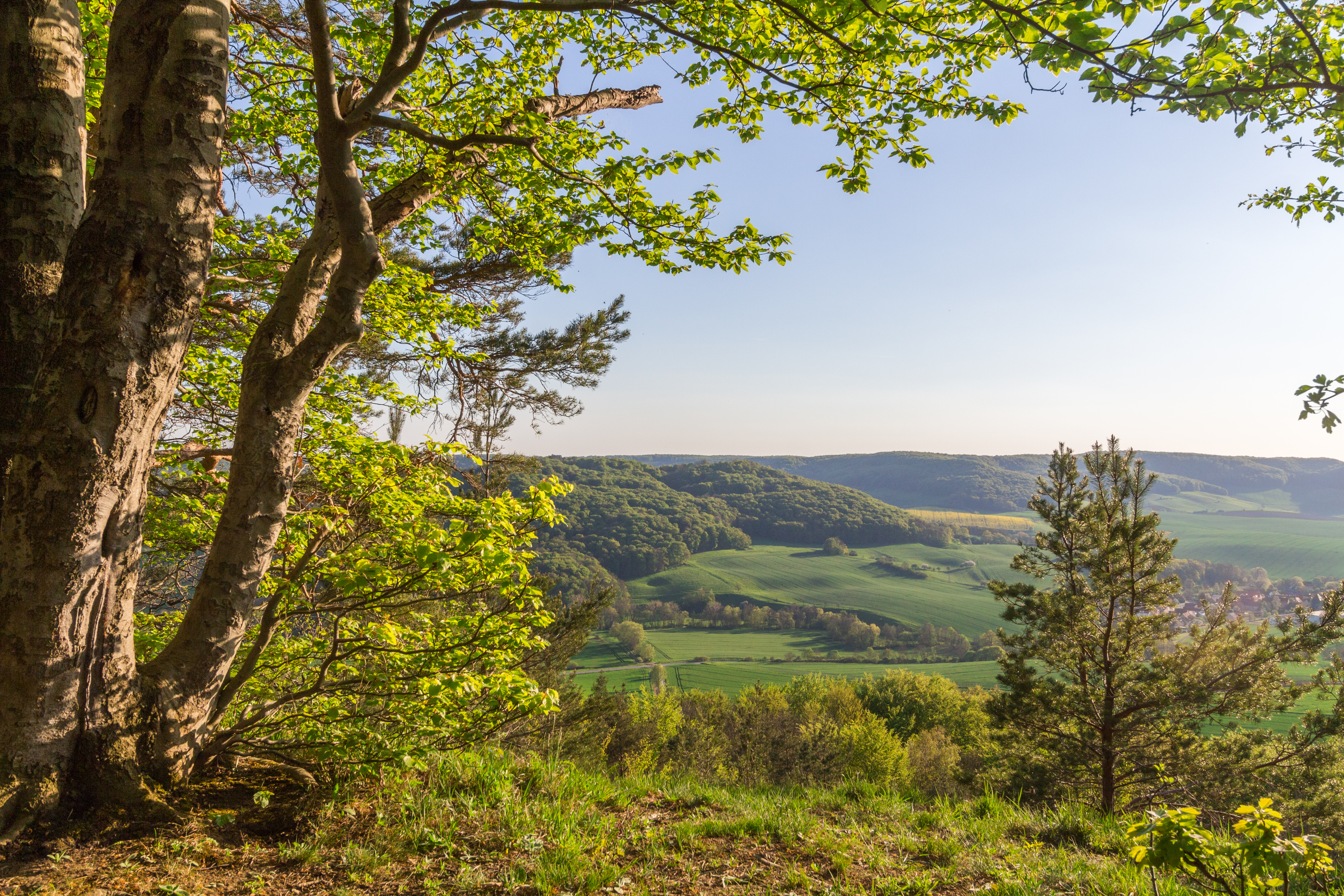 Landschaft im Saale-Holzland-Kreis (Thüringen), im Bild überwiegend Gemeindegebiet von Löberschütz: Blick von der Mönskuppe im Naturschutzgebiet „Gleistalhänge“ (Vordergrund) in südwestliche Richtung auf den Alten Gleisberg im Naturschutzgebiet „Alter Gleisberg“ (Bildmitte/links), dahinter (rechts anschließend) der Große Gleisberg mit dem Schloßberg; am rechten Bildrand die Ortslage Löberschütz